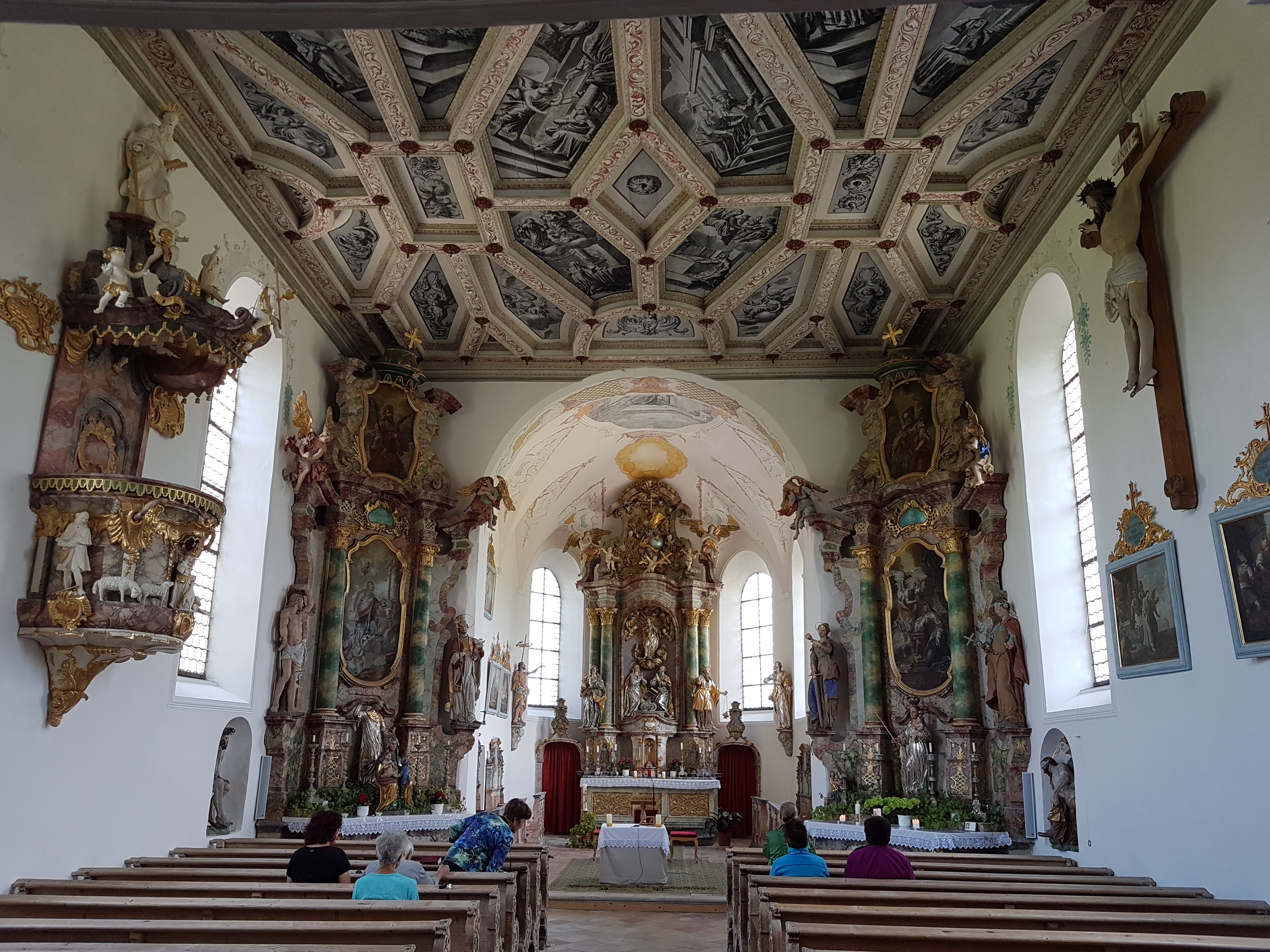 Burggen, Filialkirche St. Anna